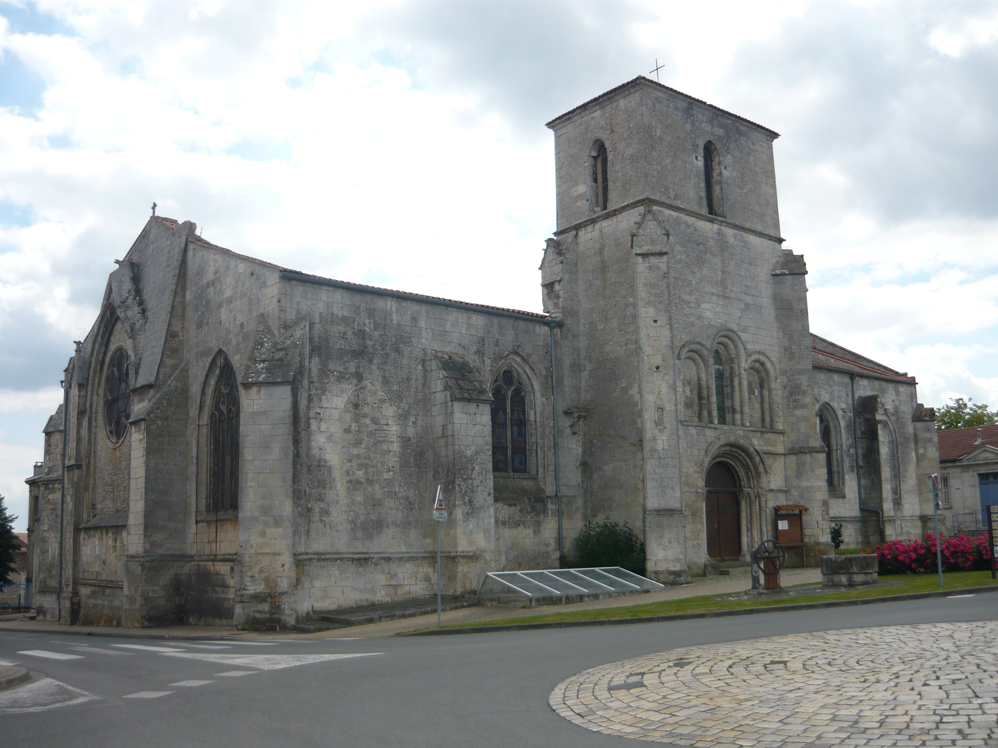 Vue d'ensemble de l'église Saint-Étienne de Tonnay-Charente